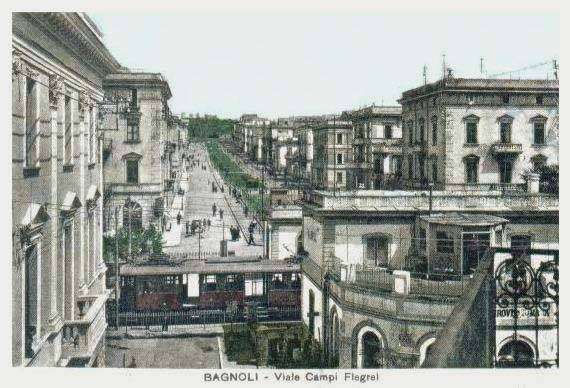 "Bagnoli - Viale Campi Flegrei" e stazione della Cumana in primo piano. Cartolina parzialmente colorata. Autore sconosciuto.